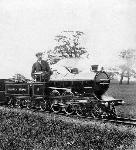 Bassett-Lowke Class 10 Atlantic (4-4-2) No 10 'Little Giant', most likely at Eaton Hall Railway on test just after being built on a photo by Franz Otto Koch